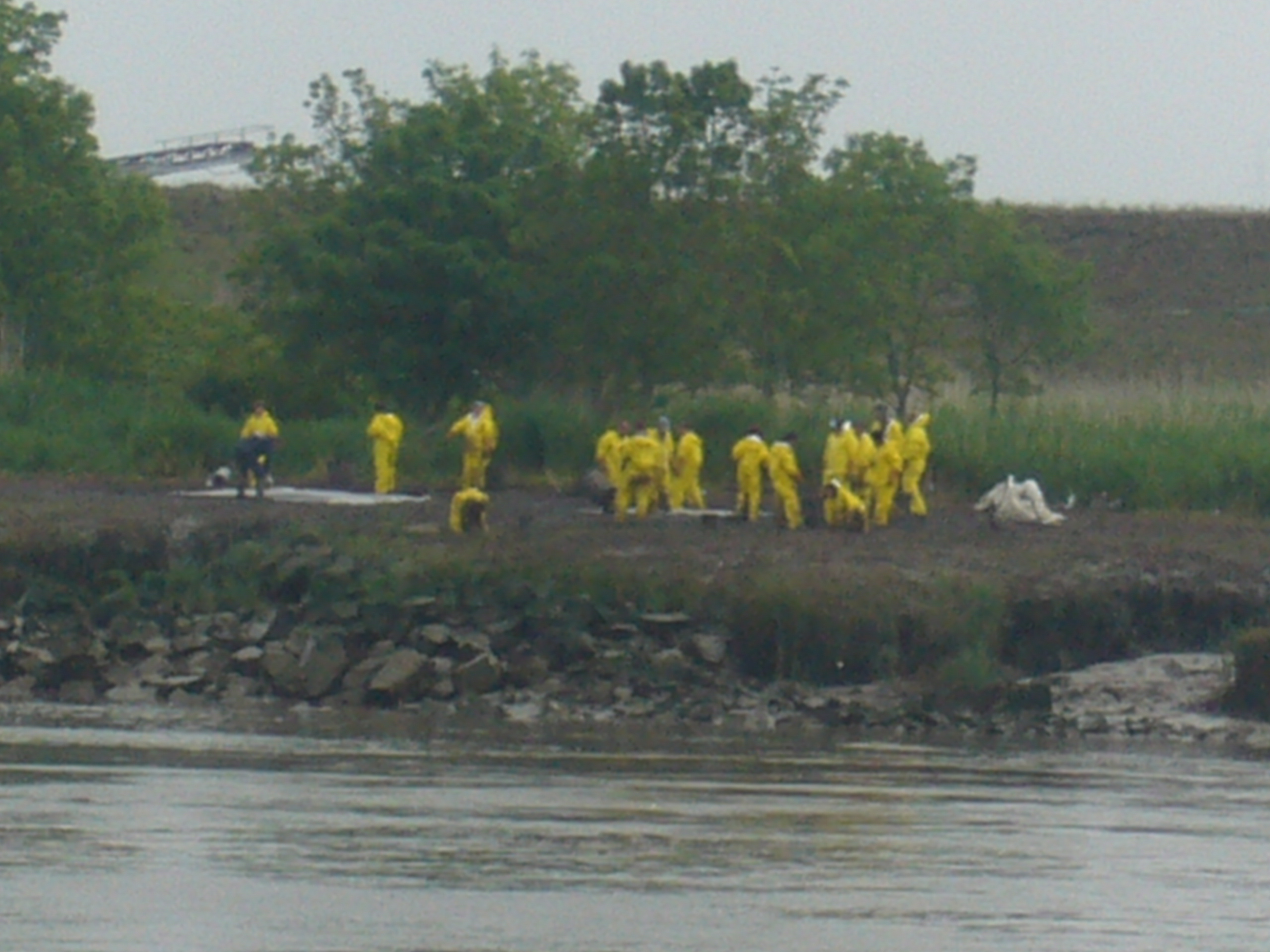 Equipe de nettoyage de la marée noire dans l'estuaire de la Loire en 2008.